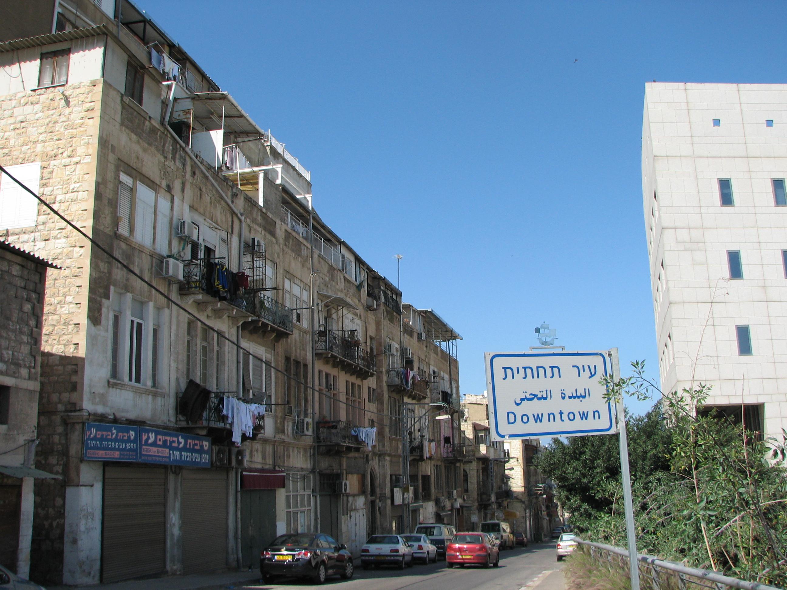 Streets in Haifa, Israel רחובות בעיר חיפה רחוב שיבת ציון, מבט לכיוון מערב, במורד הרחוב